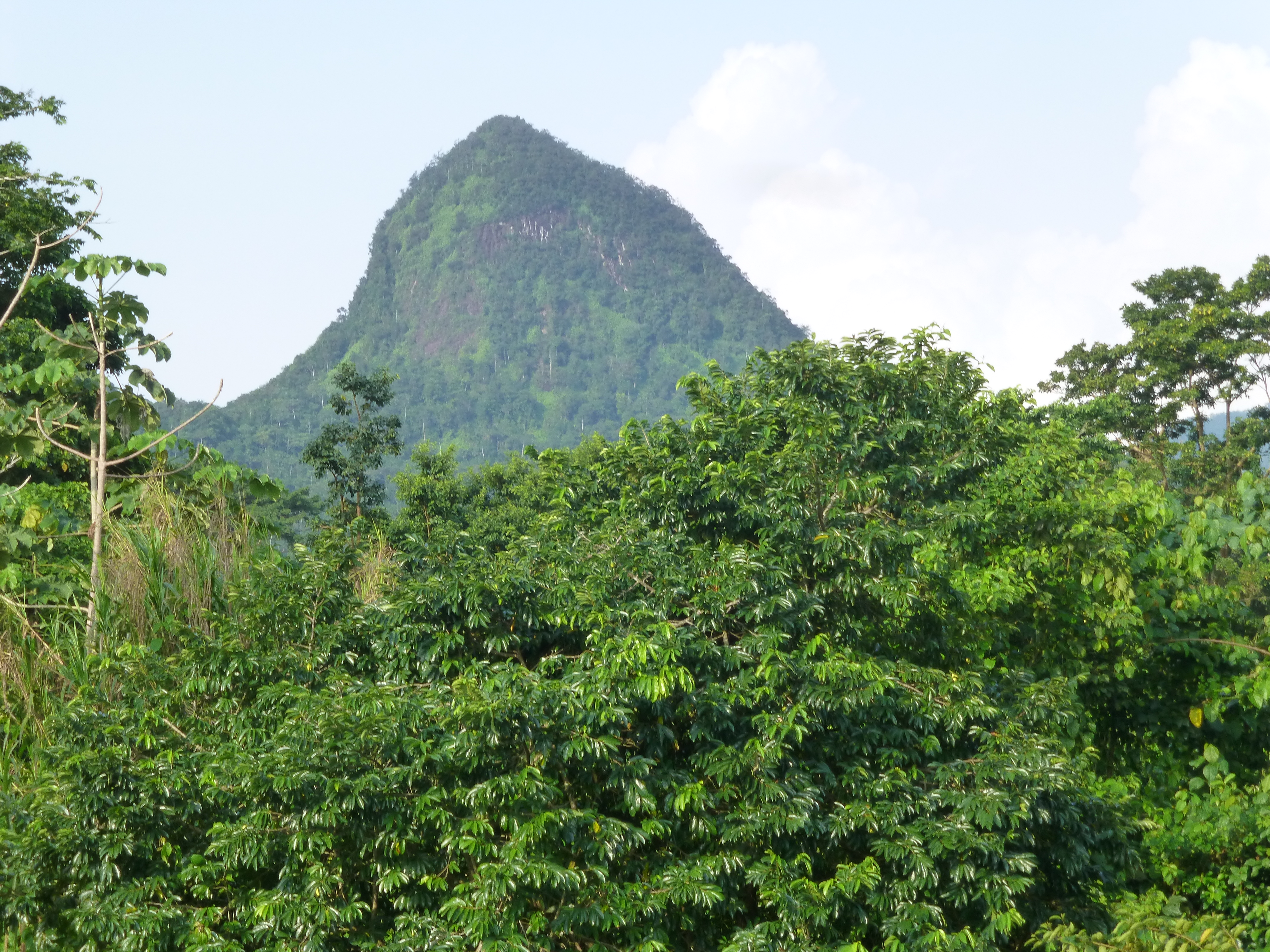 A la roça Bombaim, au centre de l'île de São Tomé (São Tomé-et-Principe).